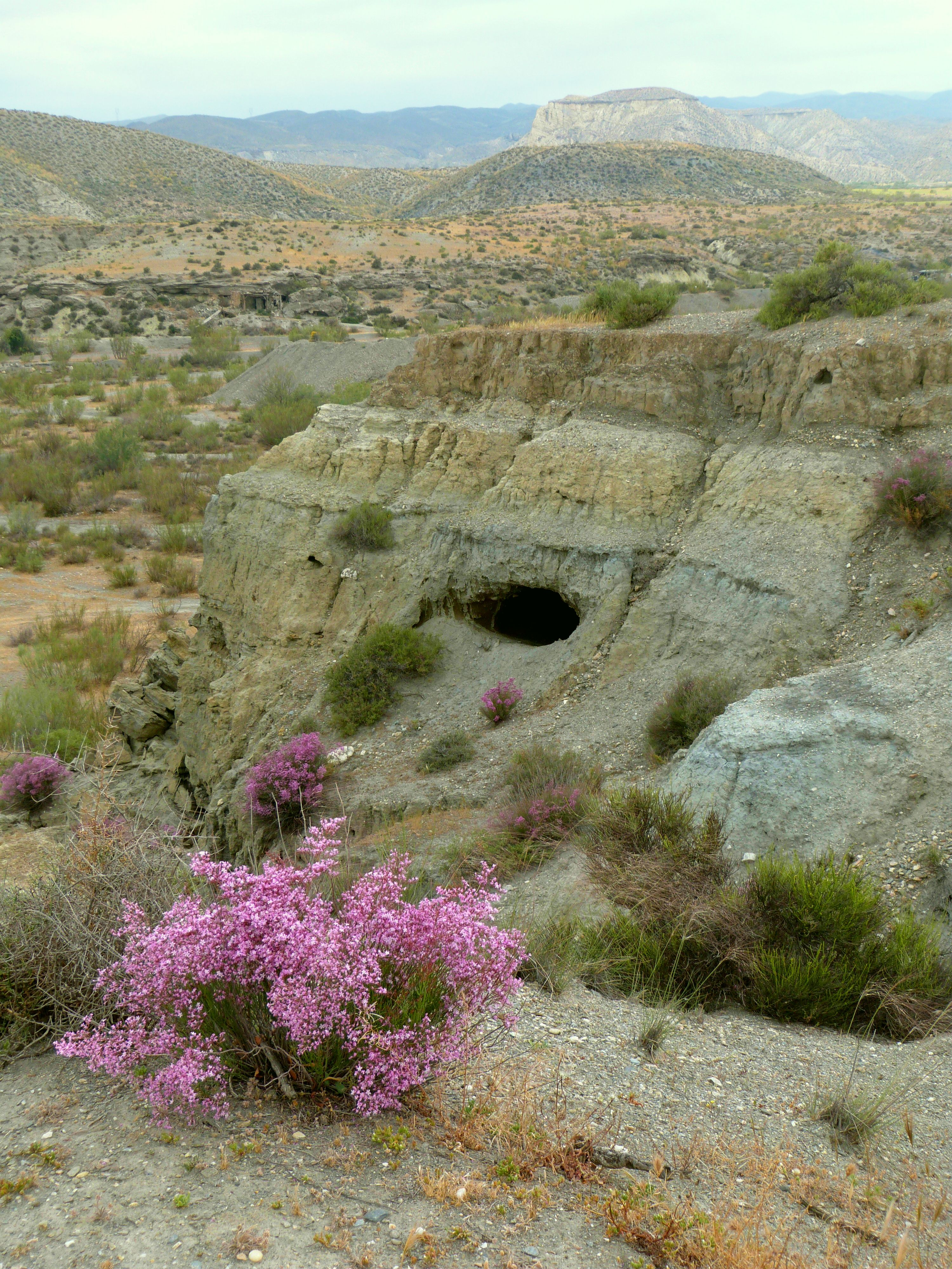 Desierto de Tabernas